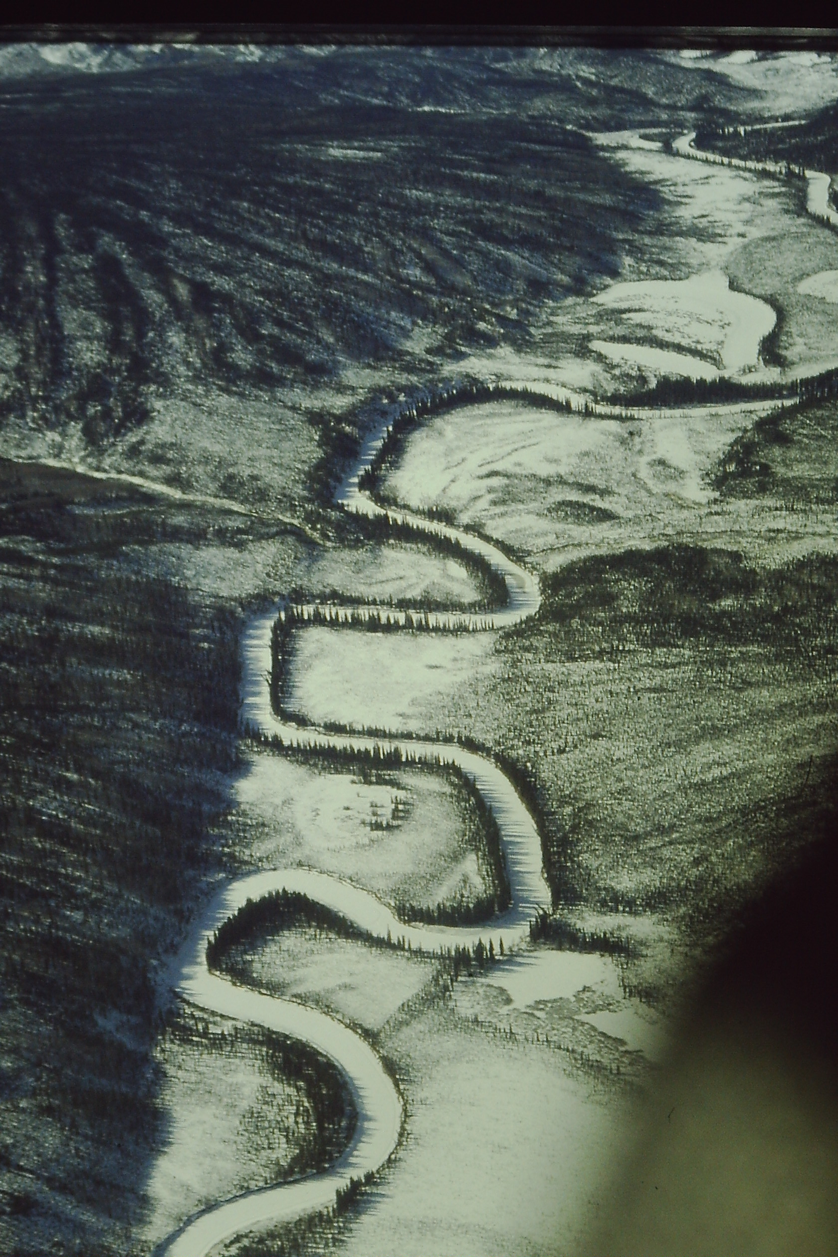 Salmon River (Kobuk River) in Alaska.